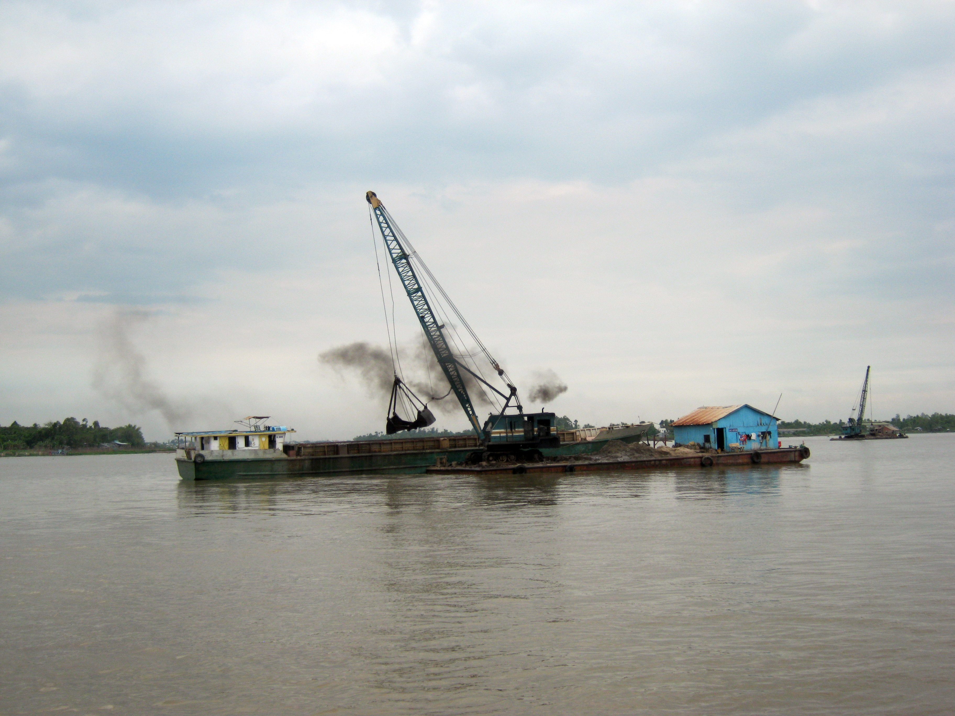 Tàu khai thác cát trên sông Hậu, đoạn chảy qua thành phố Long Xuyên (An Giang, Việt Nam)